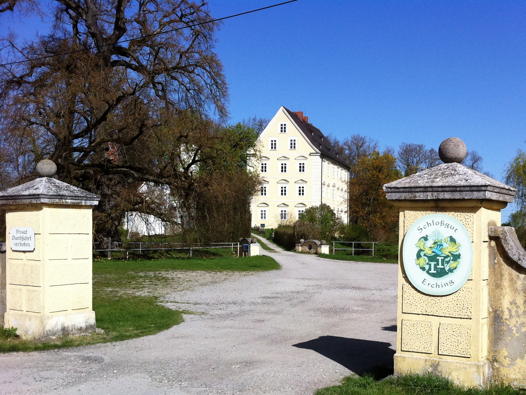 Denkmalgeschütztes Schloss Erching in der Gemeinde Hallbergmoos, Landkreis Freising, Bayern